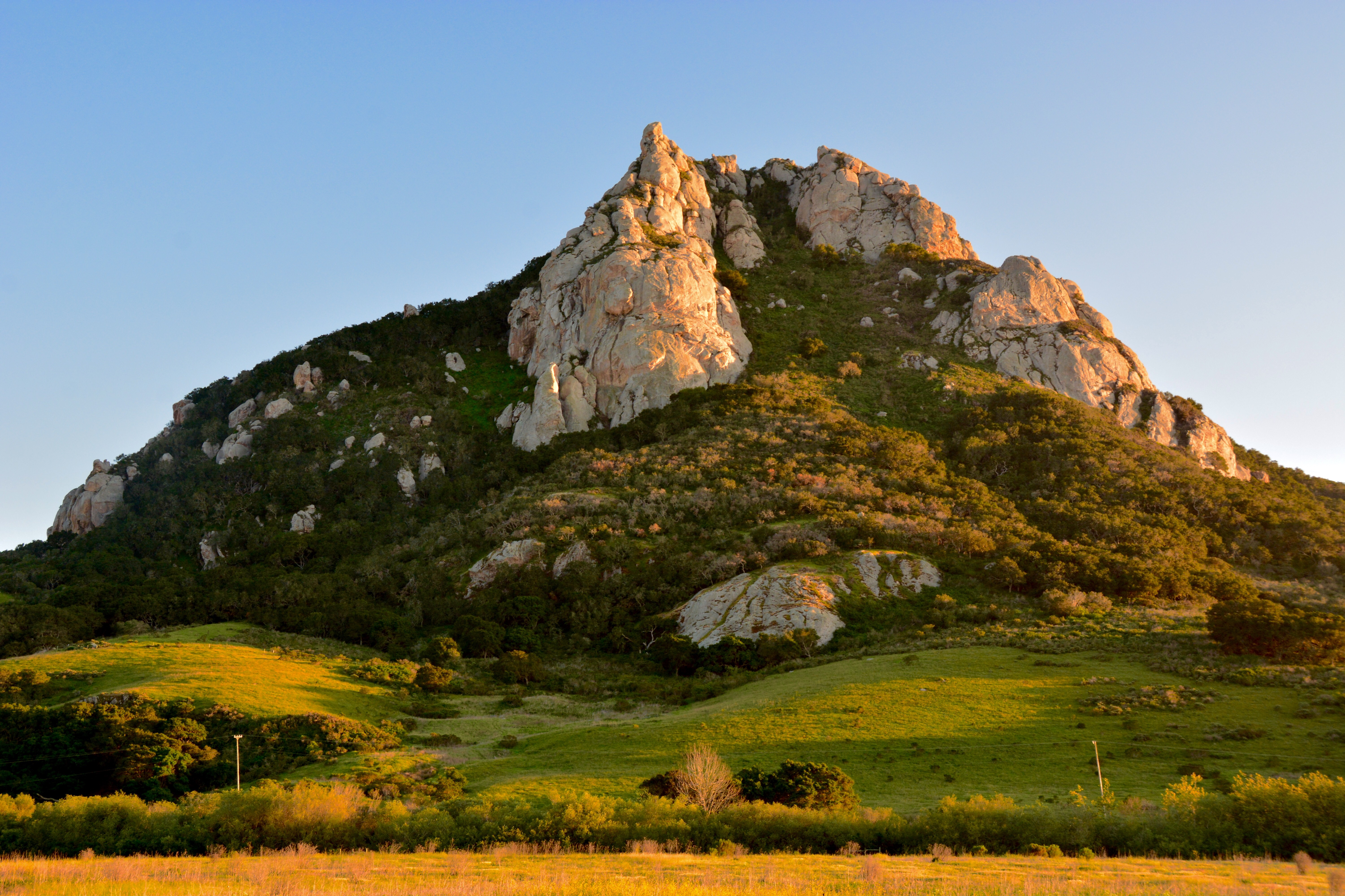 Hollister Peak